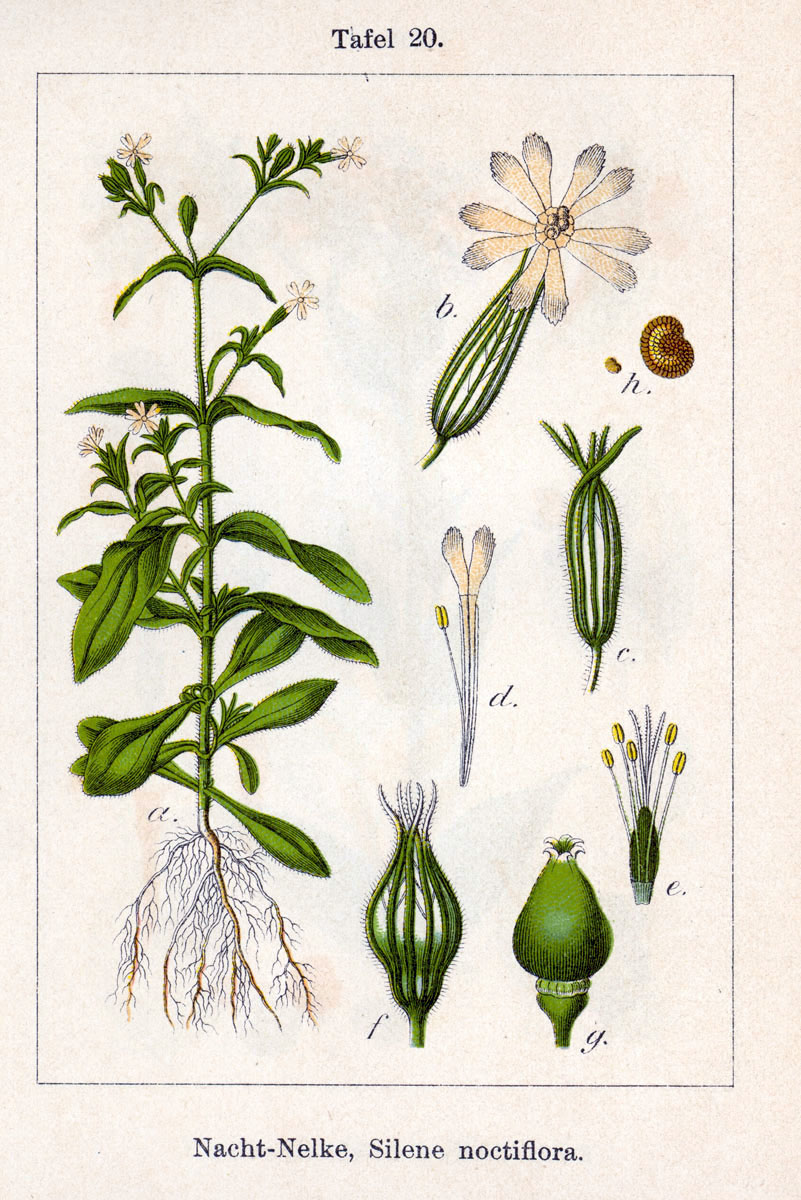 Silene noctiflora L. Original Description Nacht-Nelke, Silene noctiflora